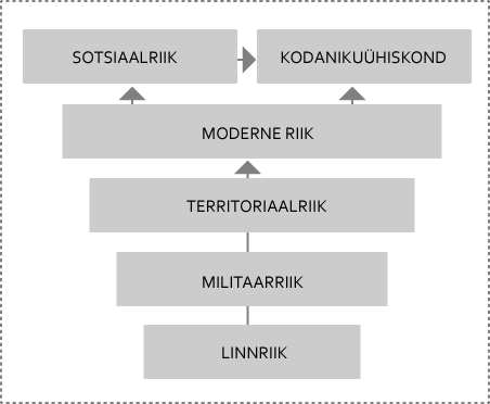 Riiklue vormid esitatuna nende ajaloolise ja loogilise arengu järjekorras.